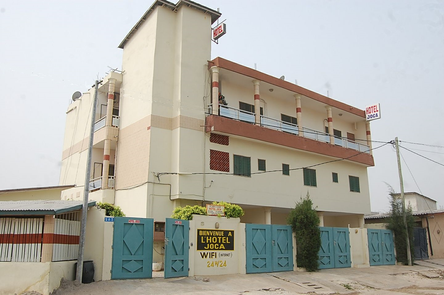 Fasado de la hotelo JOCA